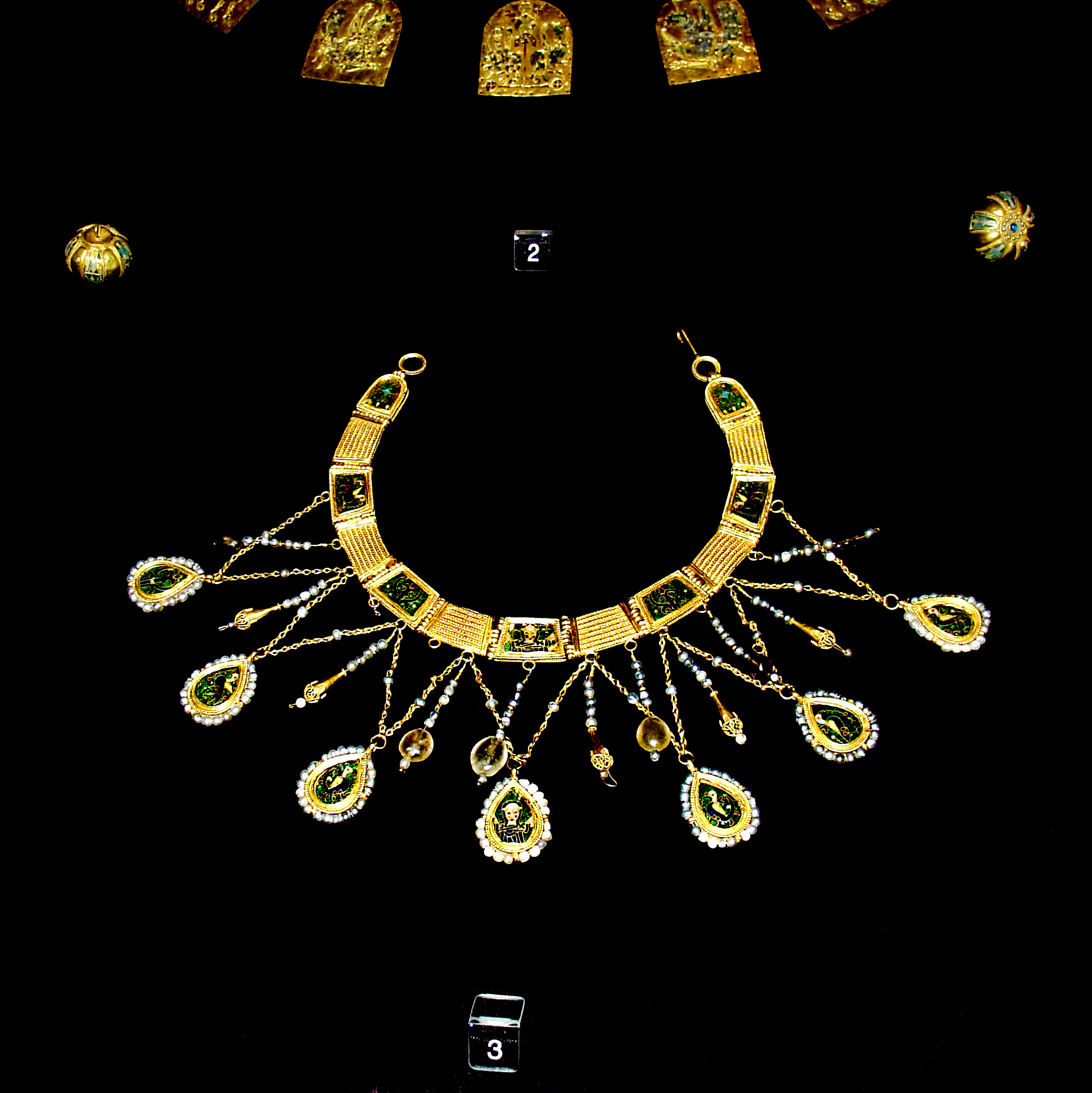 Collier à pendeloques d'époque byzantine - Fin du IX e-début du X e siècle - Découvert à Véliki Preslav au lieu-dit Kastana, en 1978 - Or, émaux, améthystes, cristaux et perles - Musée archéologique de Preslav -Inv. 3381/1